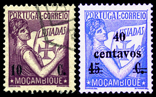 Timbres de l'Mocambique, colonie portugaise, en usage des années 1933 aux années 1938, 10 aux 40 centavos, scott#253, scott#288